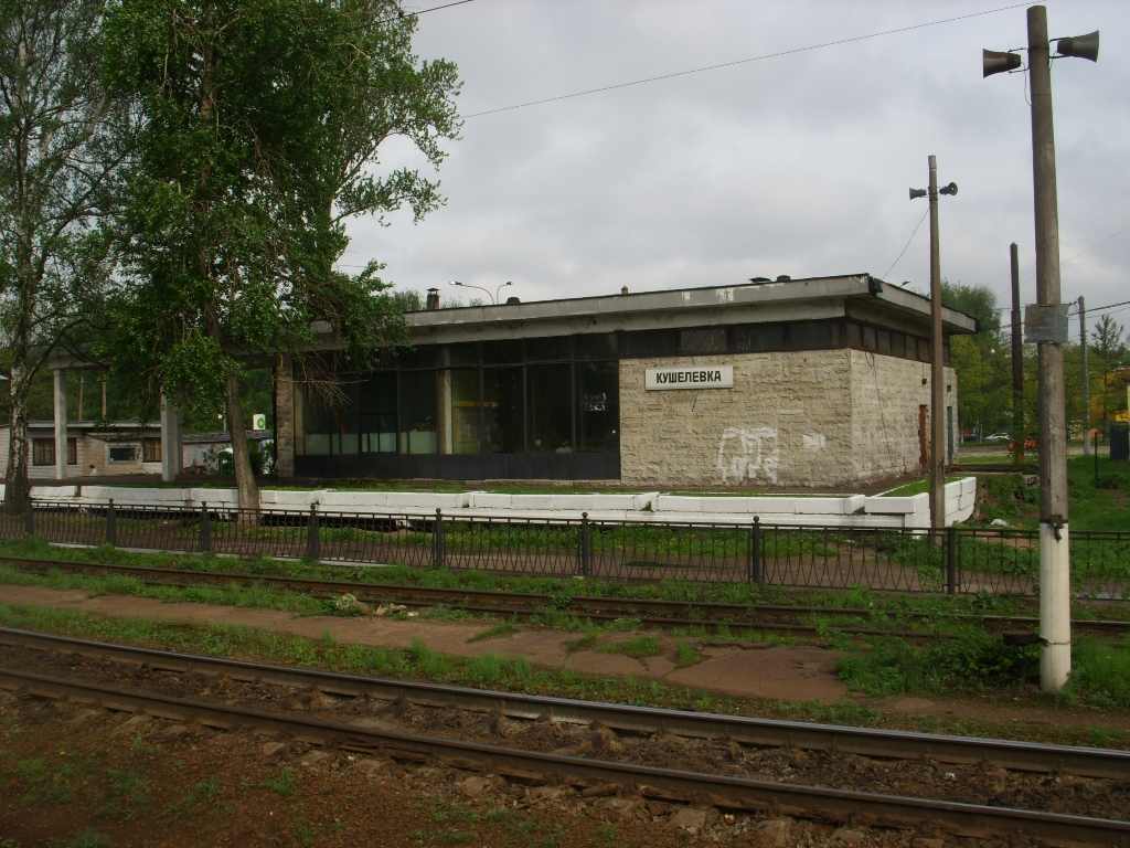 Здание вокзала